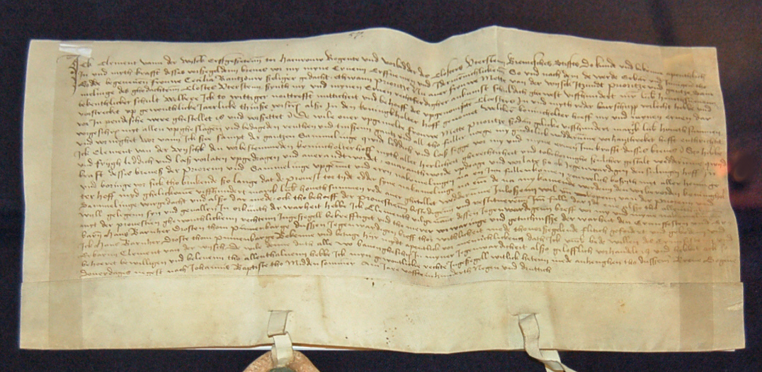 Quitungsurkunde aus dem Jahr 1539 in niederdeutsch (Plattdeutsch) abgefast. Propst Clement von der Wisch quittiert in dieser der Priorin Metta von der Wisch 500 Mark und gibt ihr den in Pfand genommenen Hof Königsholt zurück.